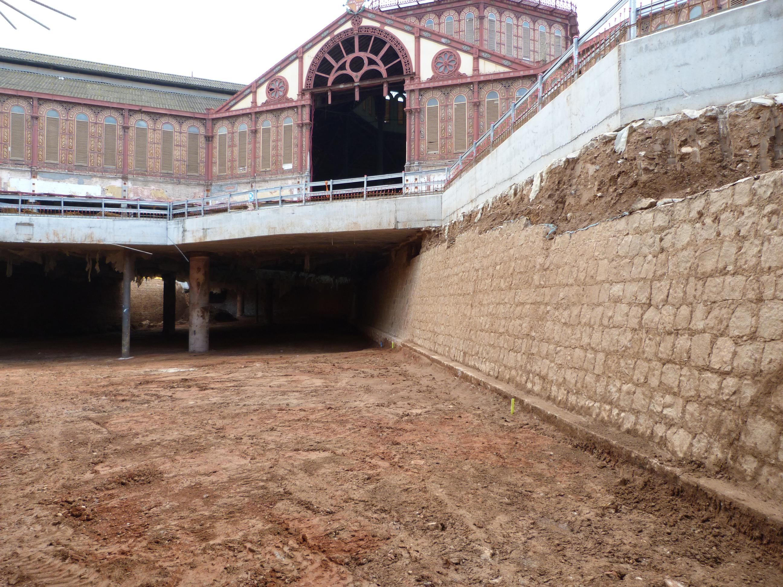 restes arqueológiques del Mercat de Sant Antoni - Baluard de Sant Antoni